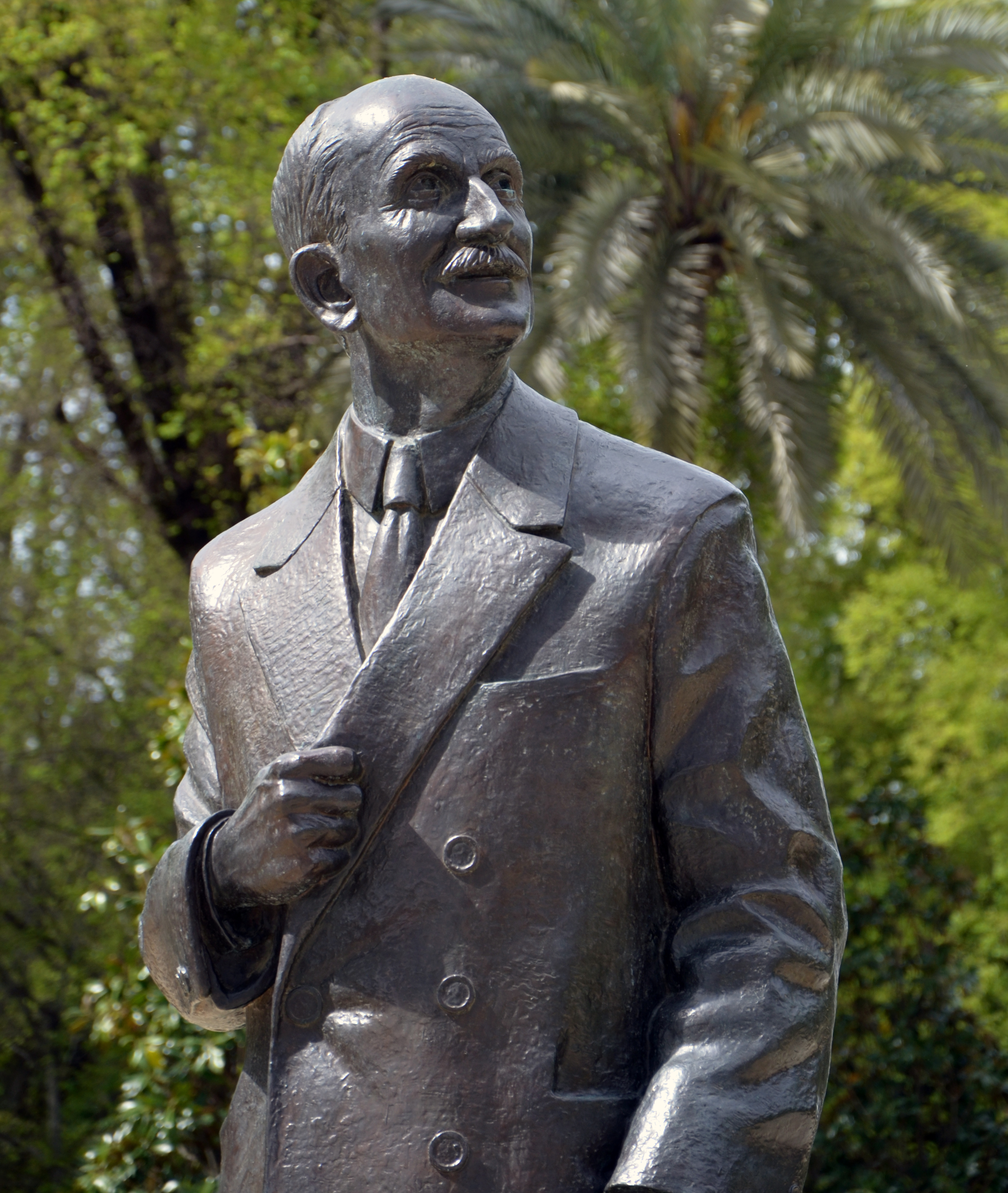 Statue de l'architecte sévillan Aníbal González, placée devant la Place d'Espagne de Séville (Espagne)